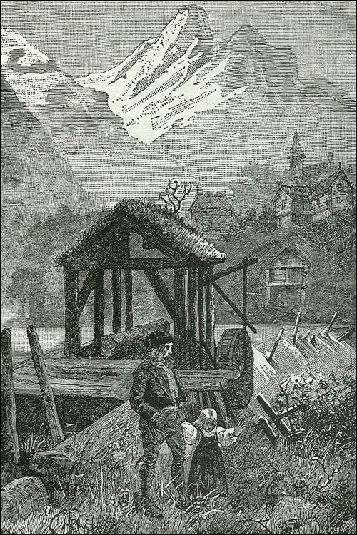 Telemarksidyll fra den franske utgaven av Jules Vernes "No. 9672", førsteutgaven.